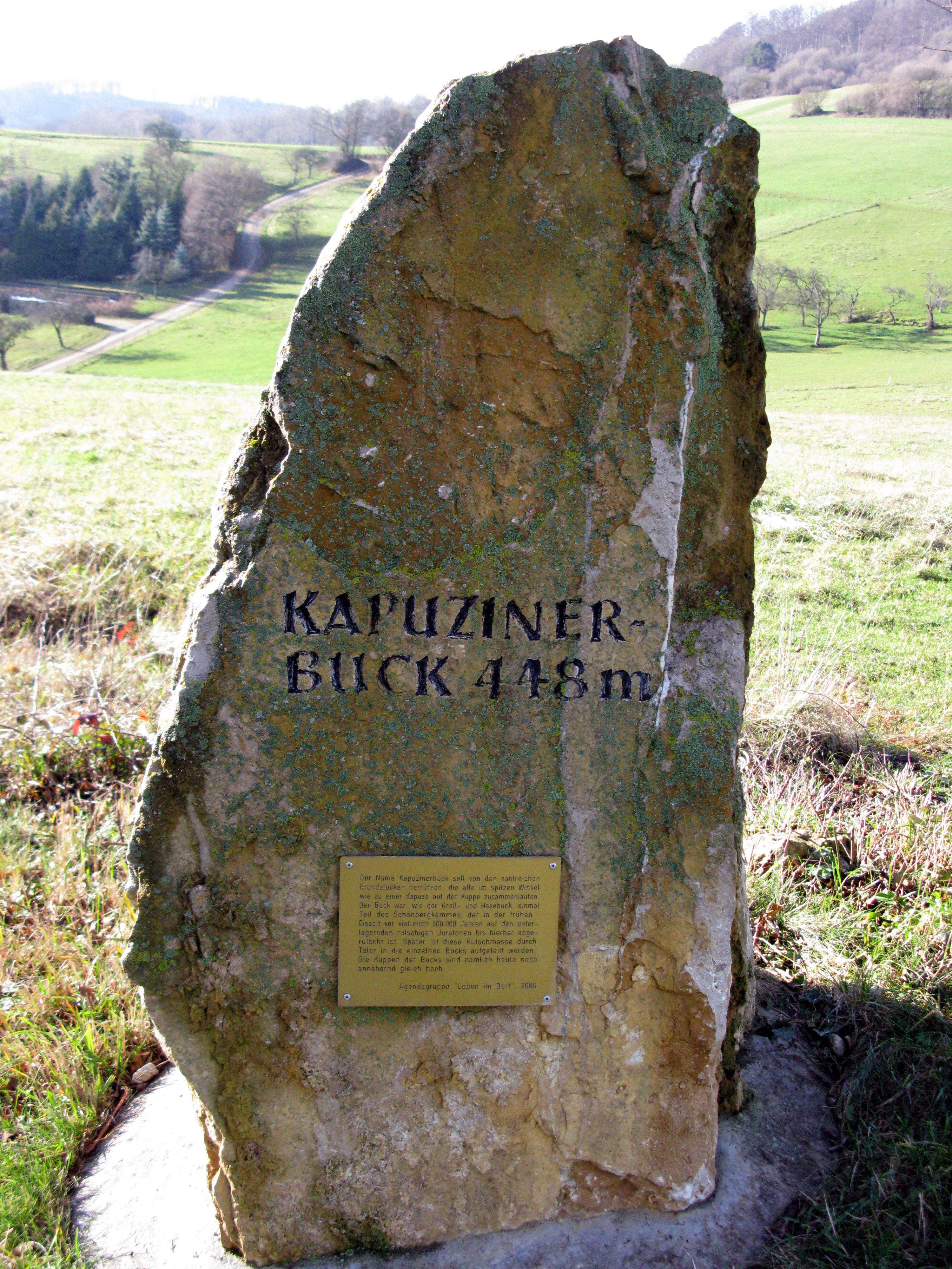 Stein auf dem Kapuzinerbuck in Wittnau